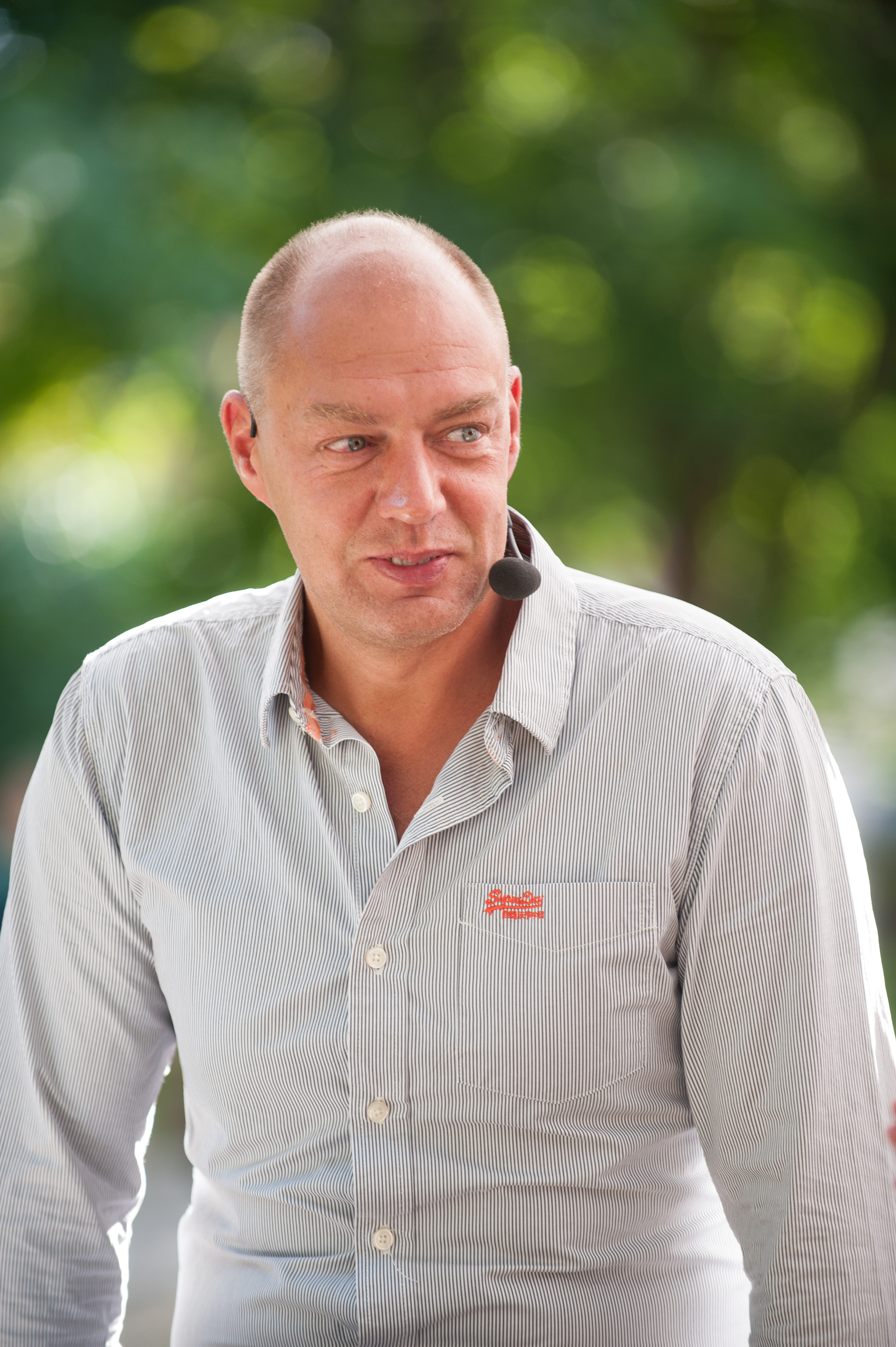 Arvamusfestival 2014: "Eesti tark võim"